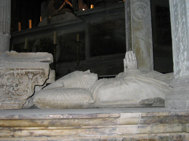 Grab des Kardinal Briconnet (Narbonne)